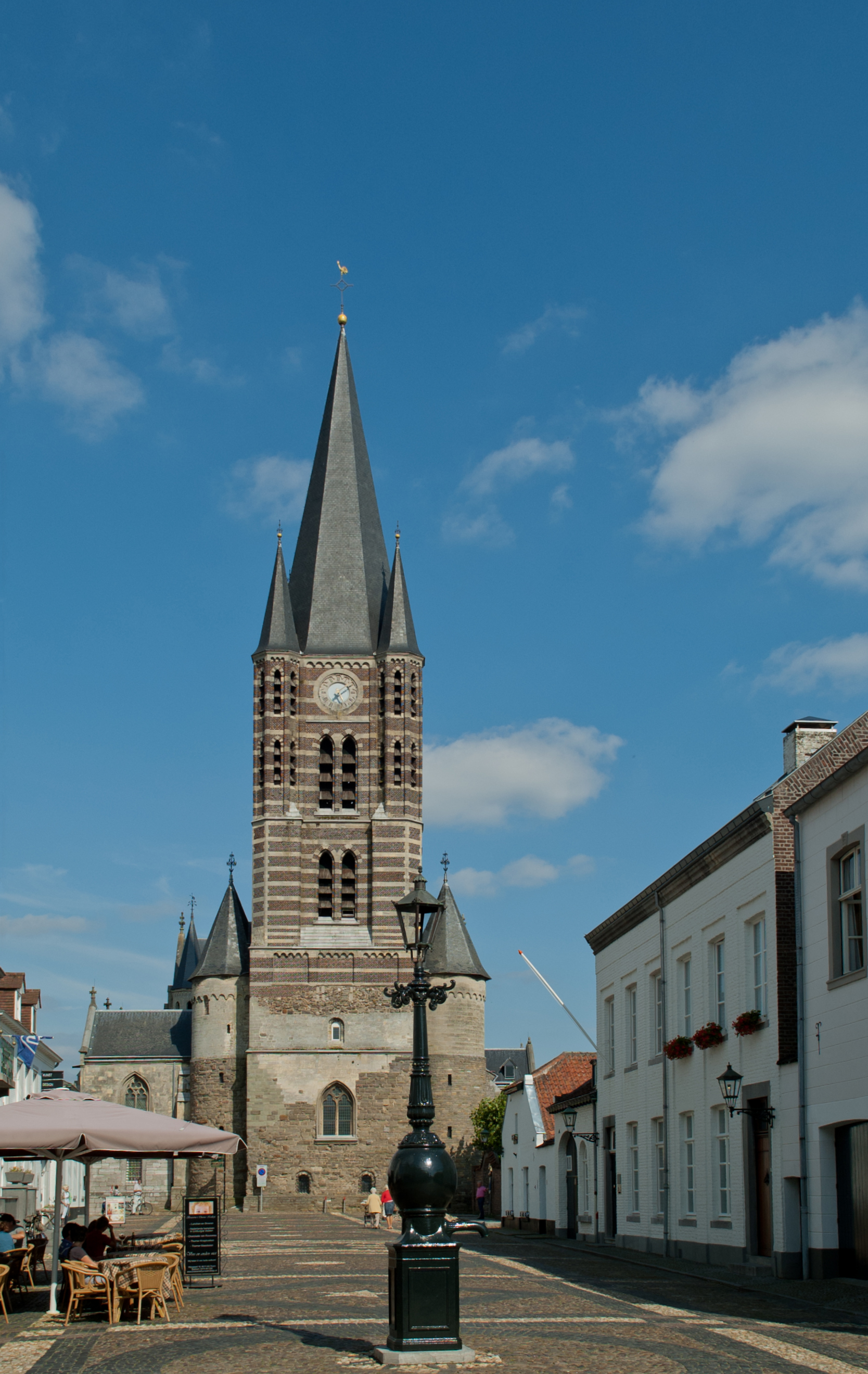 Das Westwerk der Abteikirche in Thorn, Niederlande